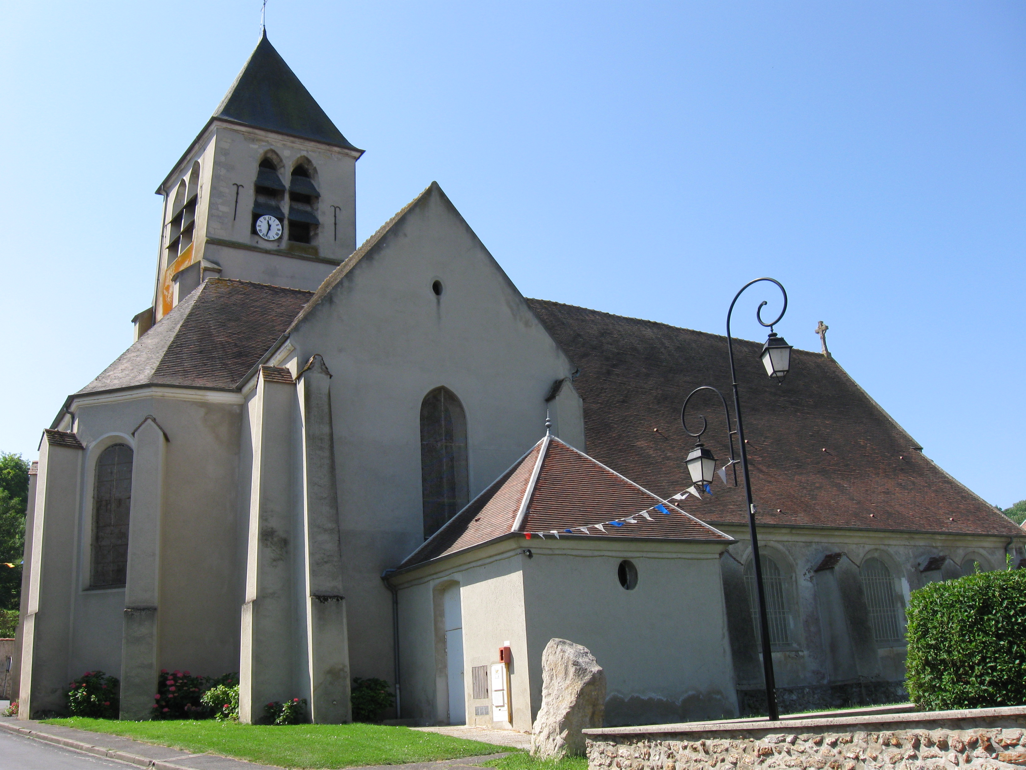 Église Saint-Jean-Baptiste de Saint-Jean-les-Deux-Jumeaux. (département de la Seine-et-Marne, région Île-de-France).